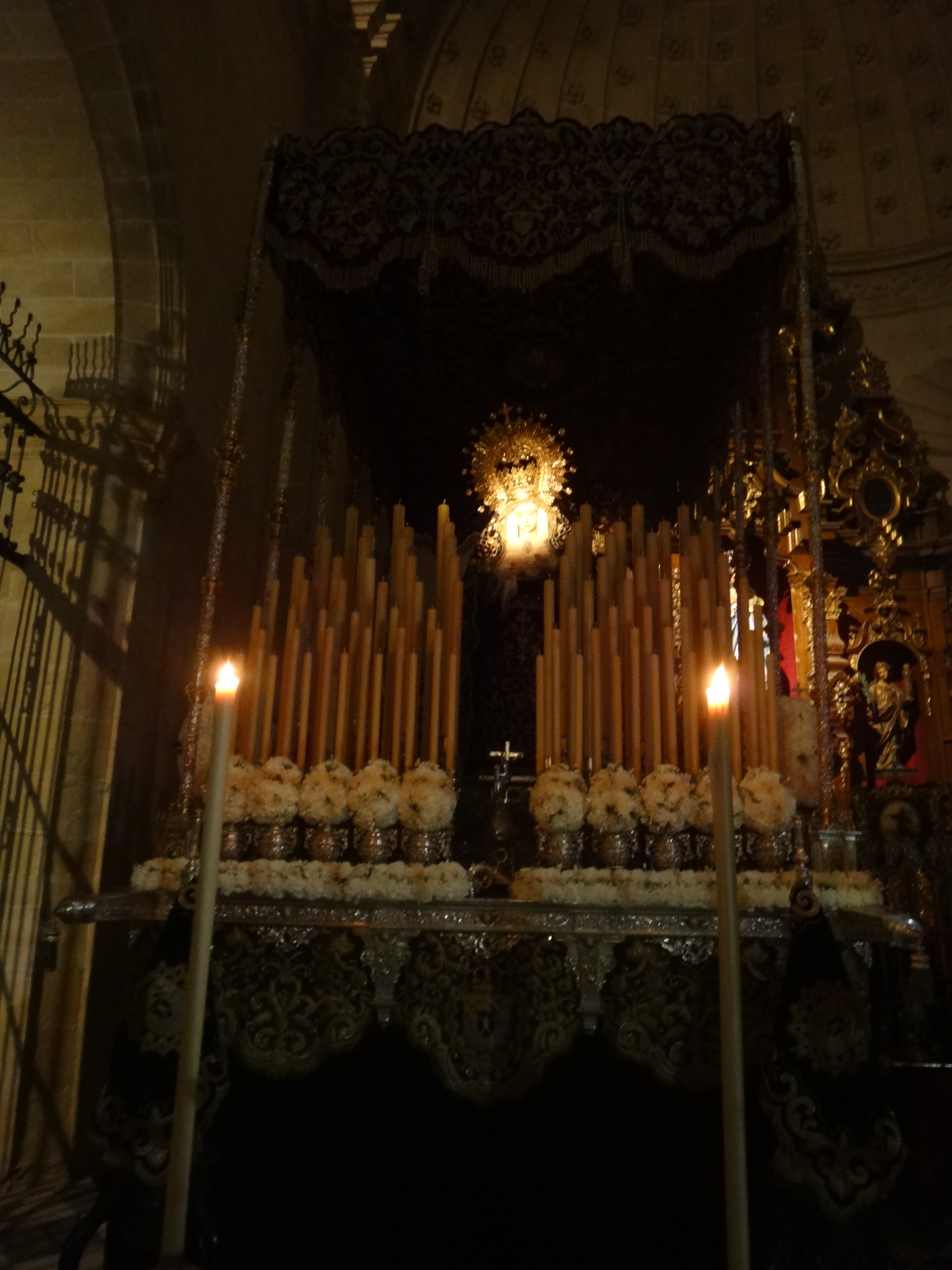 Cinco Llagas. Semana Santa de Jerez de la Frontera 2015 (Andalucía, España)